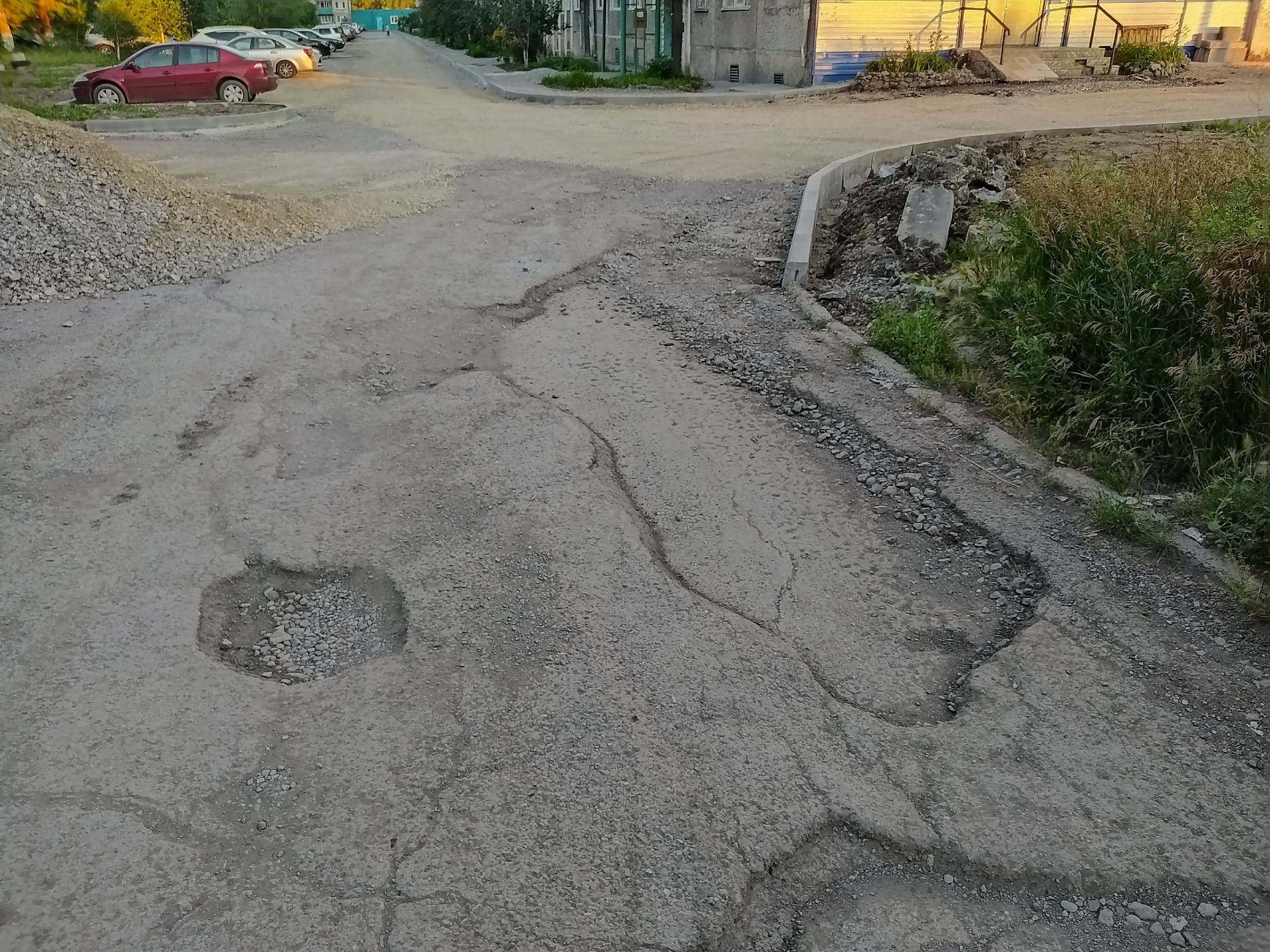 дорога